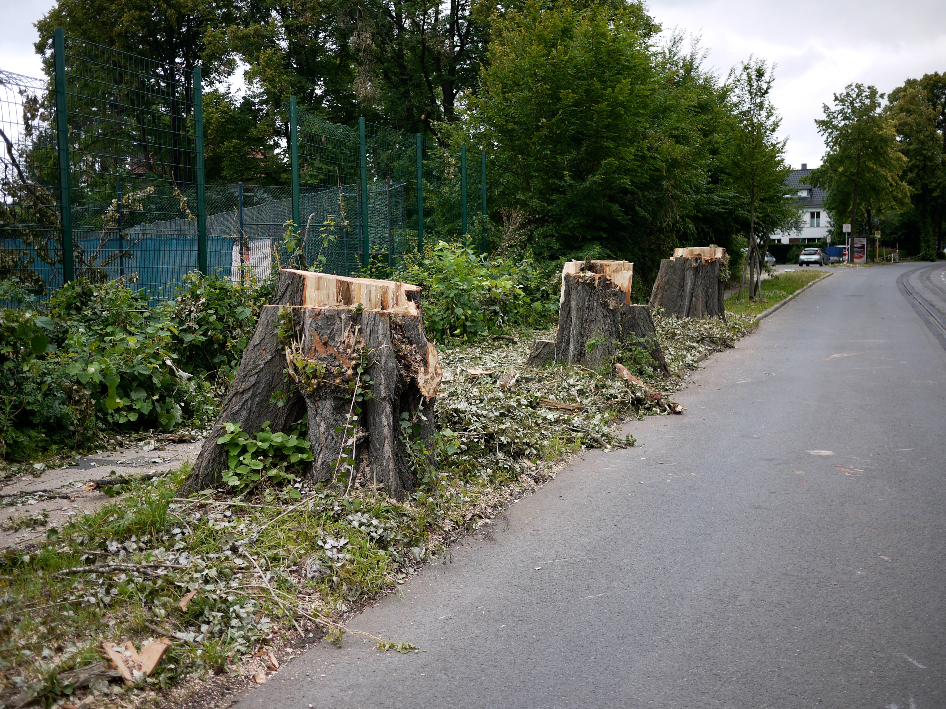 Gefällte Bäume nach Sturm "Ela", Bismarckstraße, Mülheim an der Ruhr